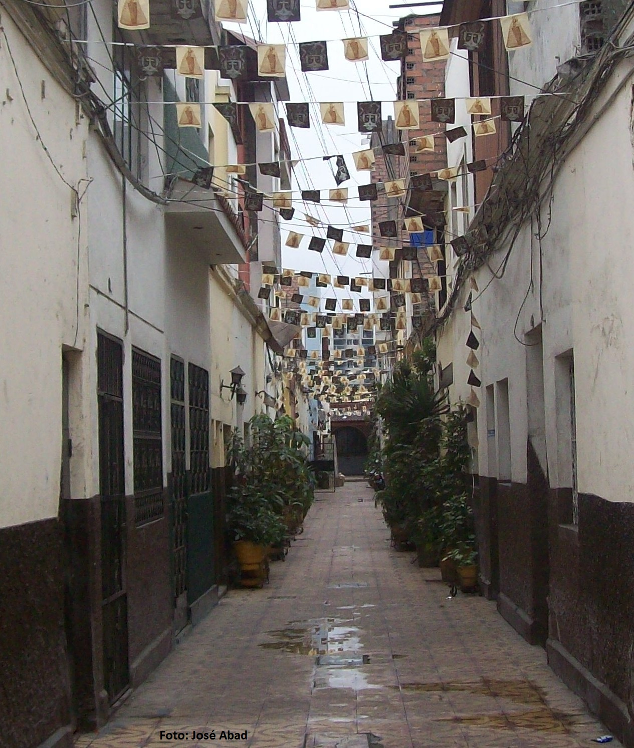 Vieja quinta en Breña adornada con guirnaldas de papel por motivo de la celebración de la Virgen del Carmen.